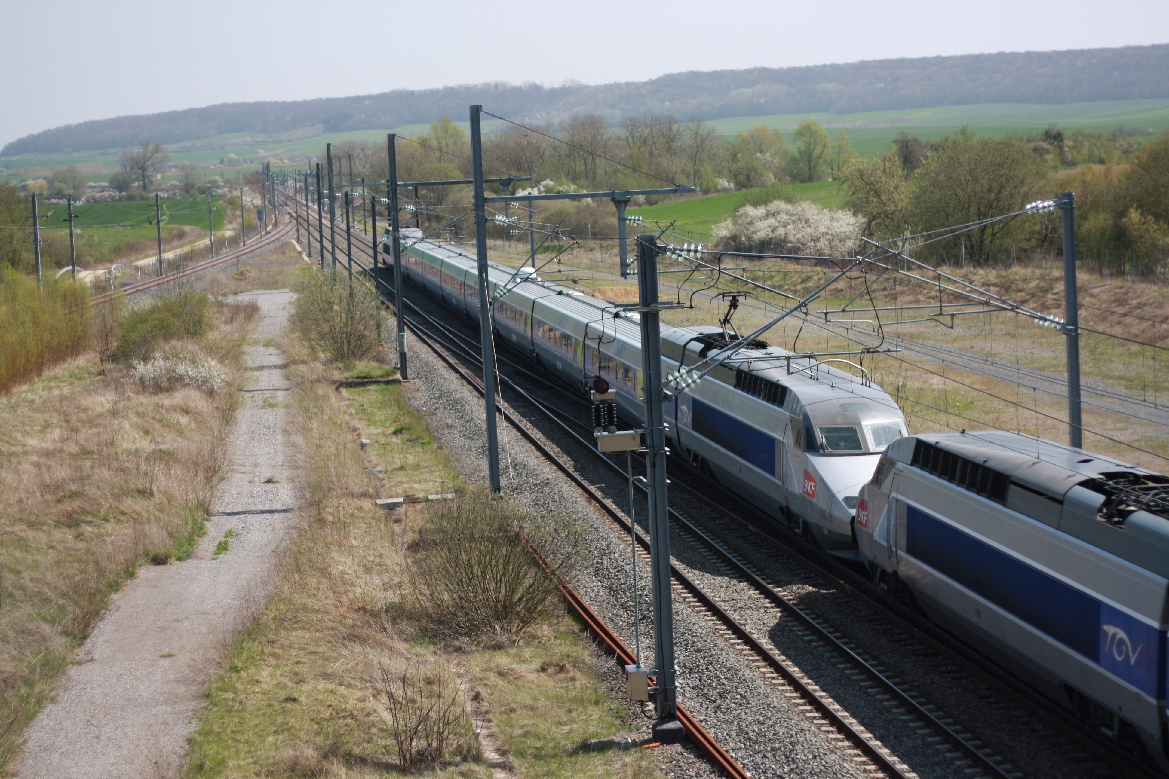 Raccordement de Baudrecourt, passage du TGV au droit de l'ancien bâtiment voyageurs (détruit) de la gare de Baudrecourt